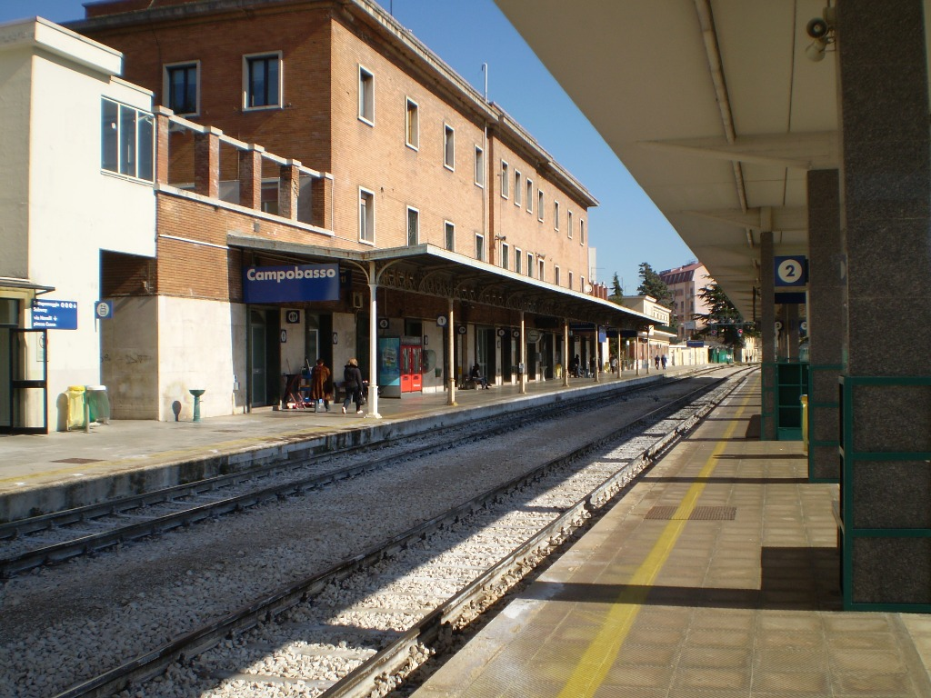 L'interno della stazione di Campobasso